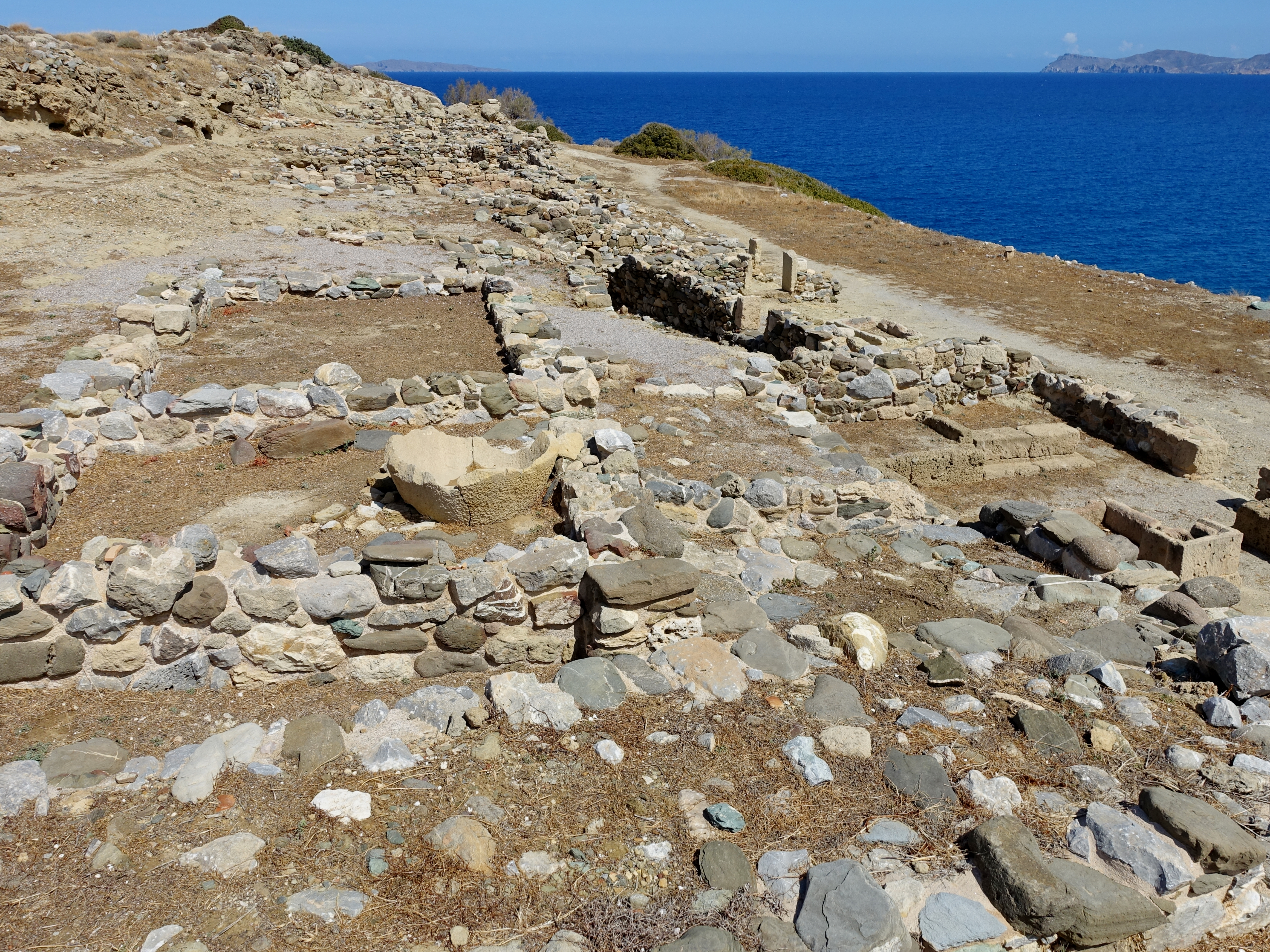 Archäologische Ausgrabungsstätte der hellenistischen Stadt Trypitos (Τρυπητός), Gemeinde Sitia, Kreta, Griechenland